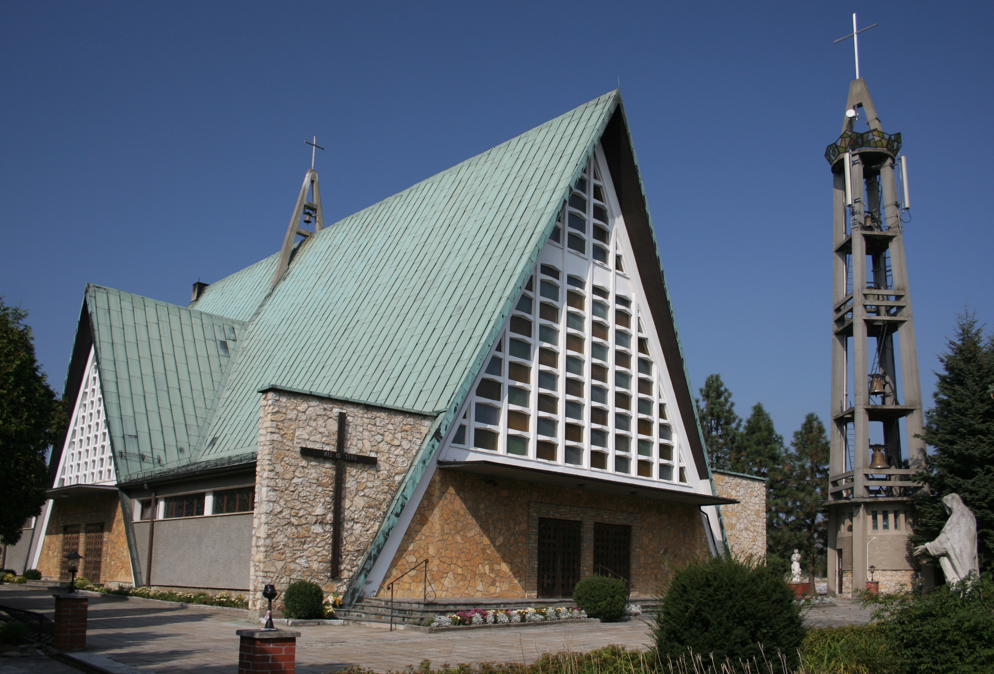 Kościół NMP Królowej w Smolnicy, woj. śląskie